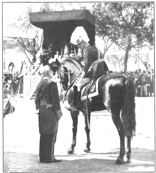 S. M. el rey hablando con el presidente del Consejo D. Antonio Maura, durante la ceremonia de la jura de la bandera verificada el domingo último en el paseo de la Castellana. Fot. Nuevo Mundo por Campúa.